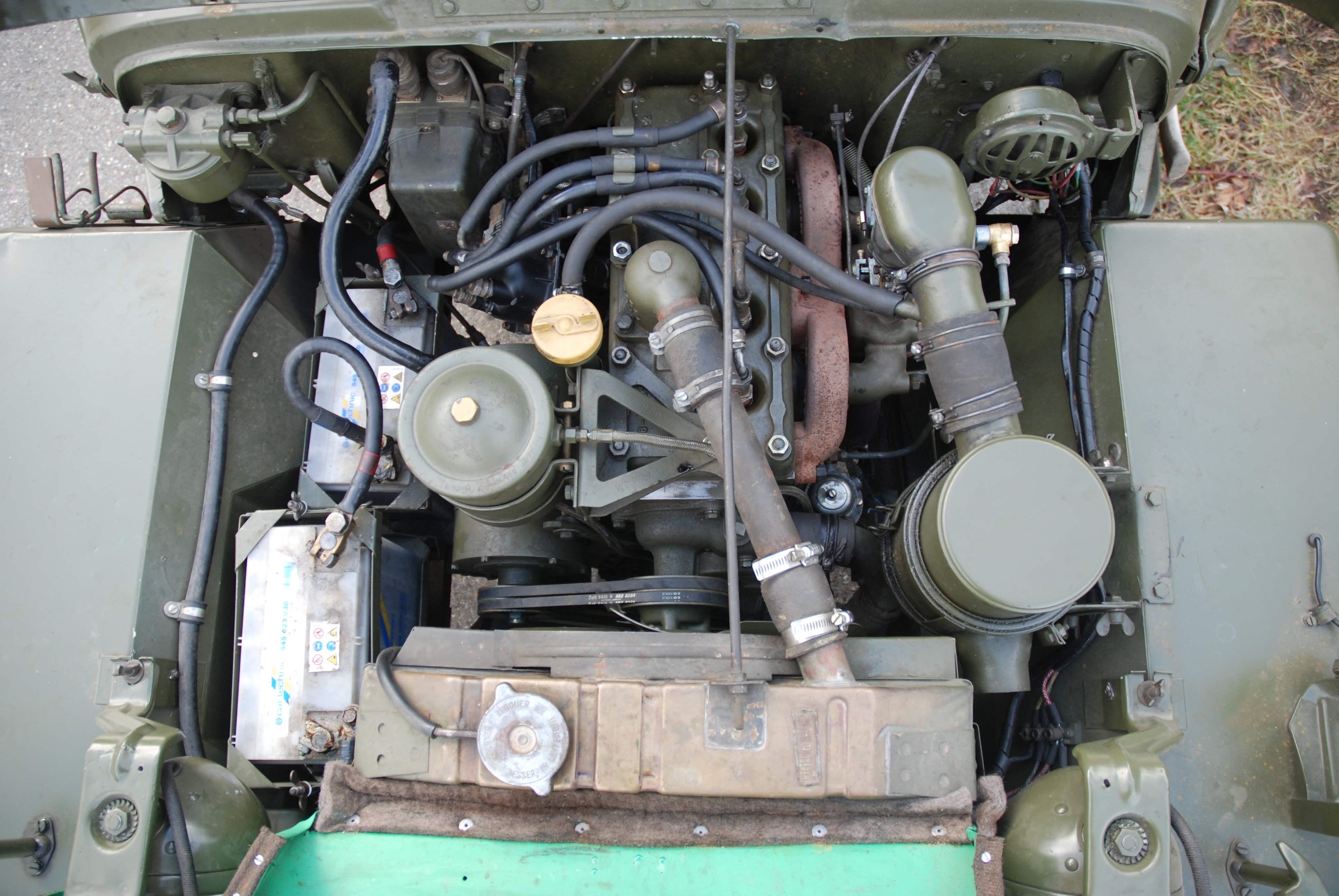 Go Devil Engine in Jeep M201